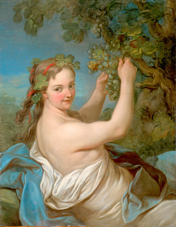 Erigone